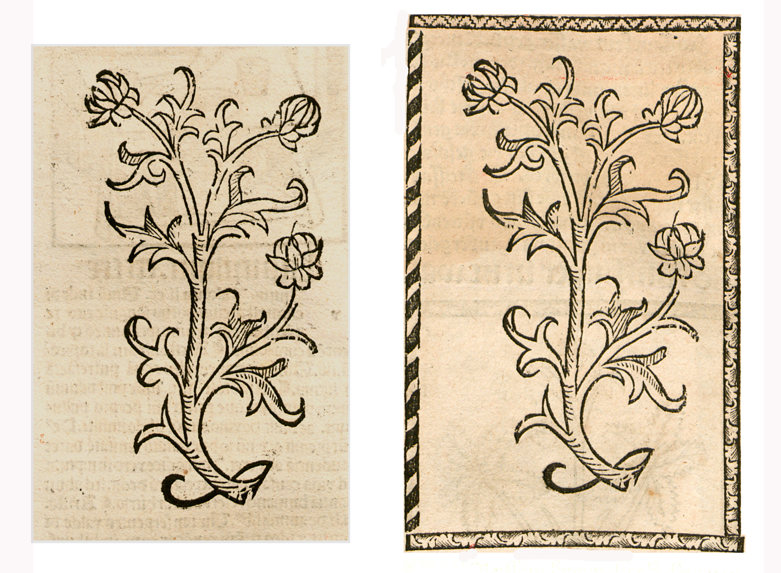 Abbildung zum Kapitel Freissam krut (Viola tricolor)